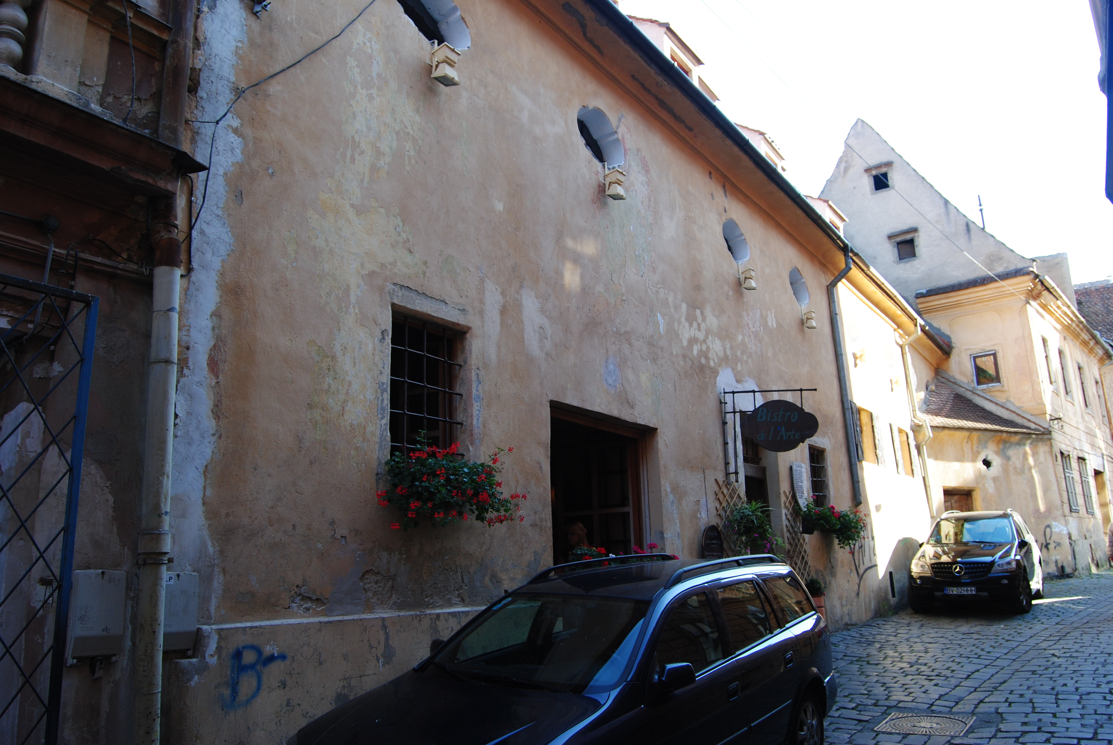 Fost atelier de tâmplărie și depozit de marfă; Piața Enescu 11 bis, Brașov